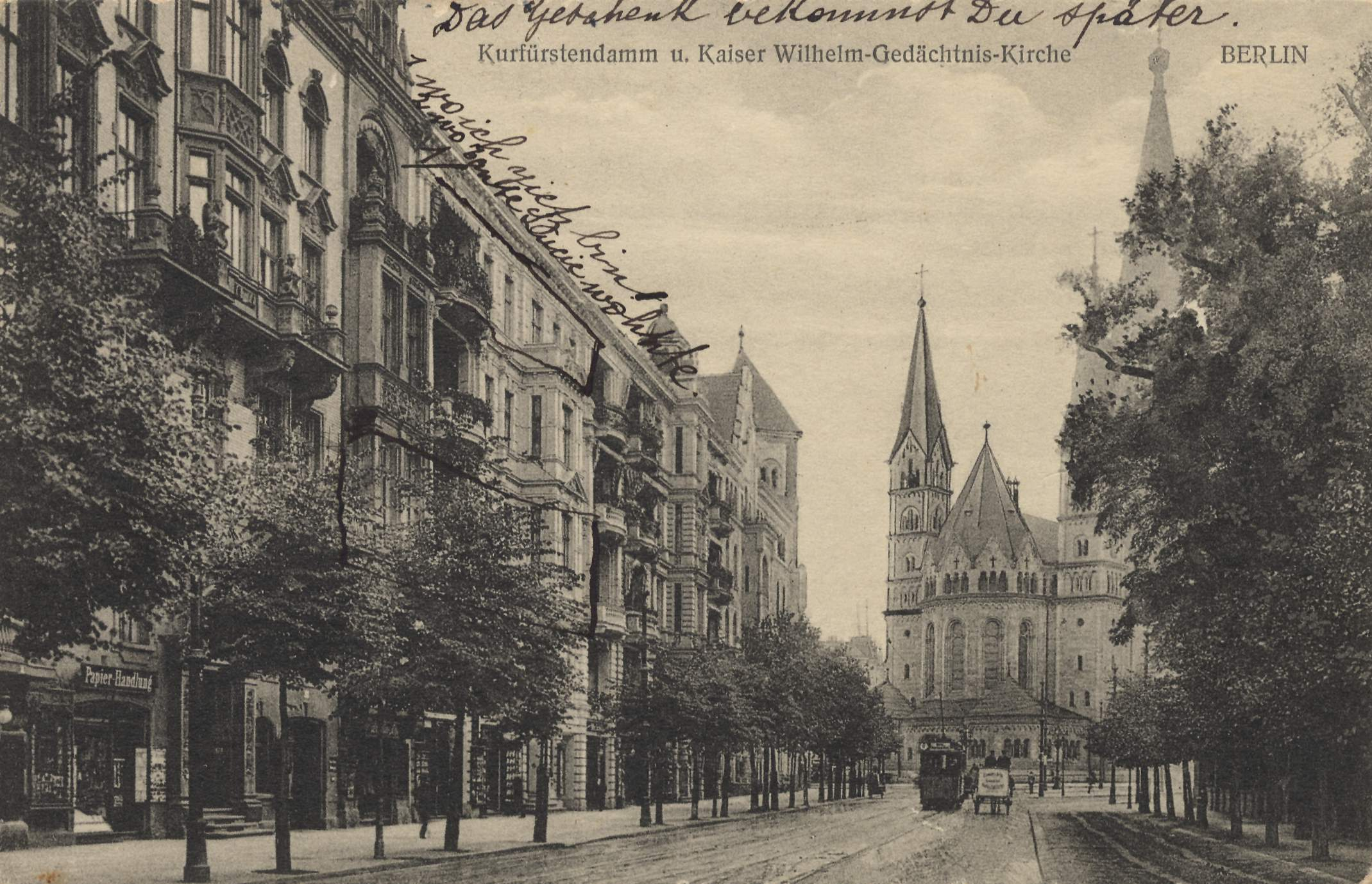 Blick vom Kurfürstendamm zur Kaiser-Wilhelm-Gedächtniskirche